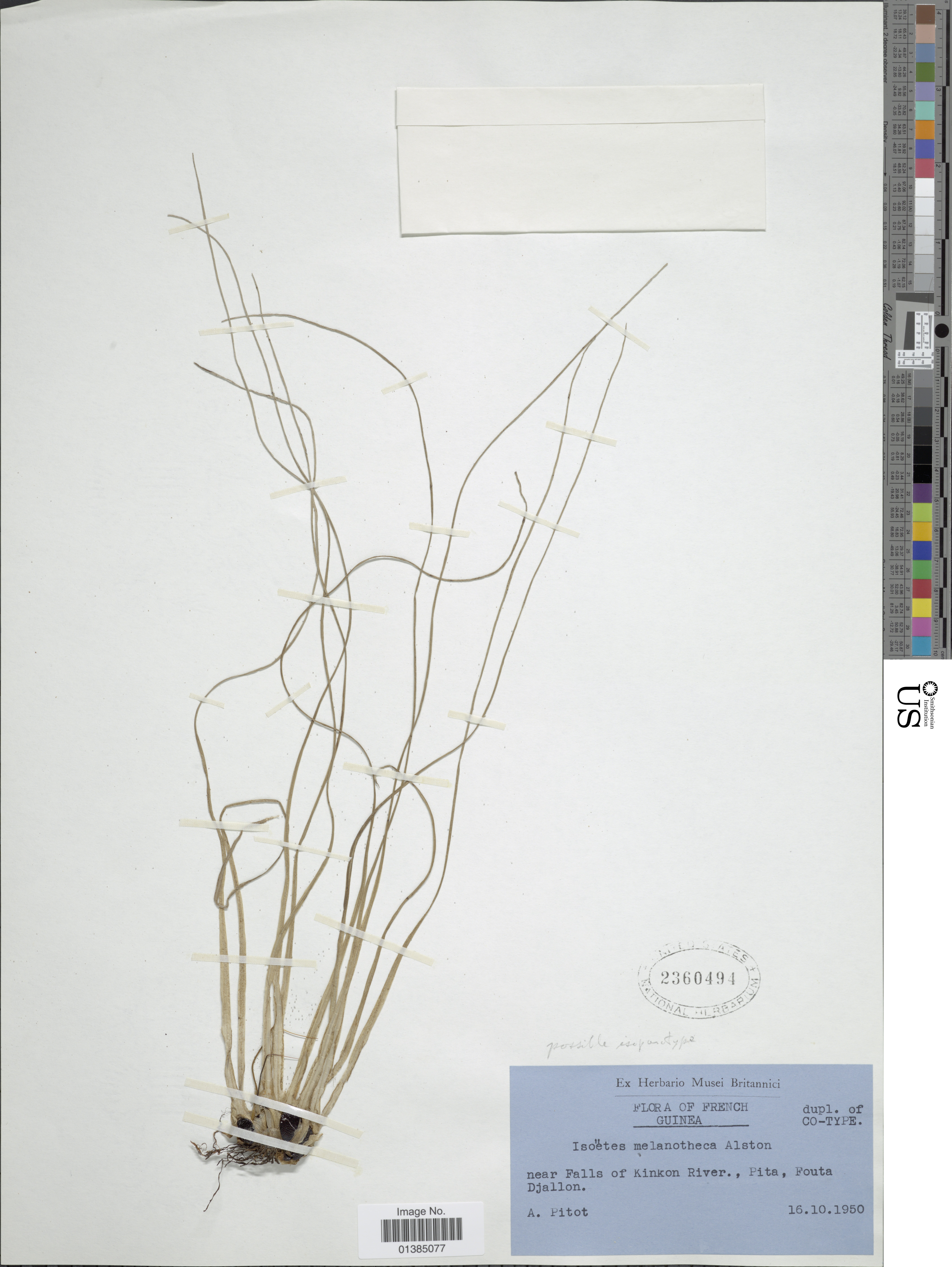 Isoetes melanotheca Alston Object Details Biogeographical Region 82 - Northern South America Collector A. Pitot Record Last Modified 30 Jun 2016 Specimen Count 1 Collection Date 16 Oct 1950 Barcode 01385077 USNM Number 2360494 Place Near Falls of Kinkon River, Pita, Fouta Djallon., French Guiana, South America - Neotropics Published Name Isoetes melanotheca Alston Taxonomy Plantae Pteridophyte Isoetales Isoetaceae NMNH - Botany Dept. Record ID nmnhbotany_12206431 Usage of Metadata (Object Detail Text) CC0 GUID (Link to Original Record)